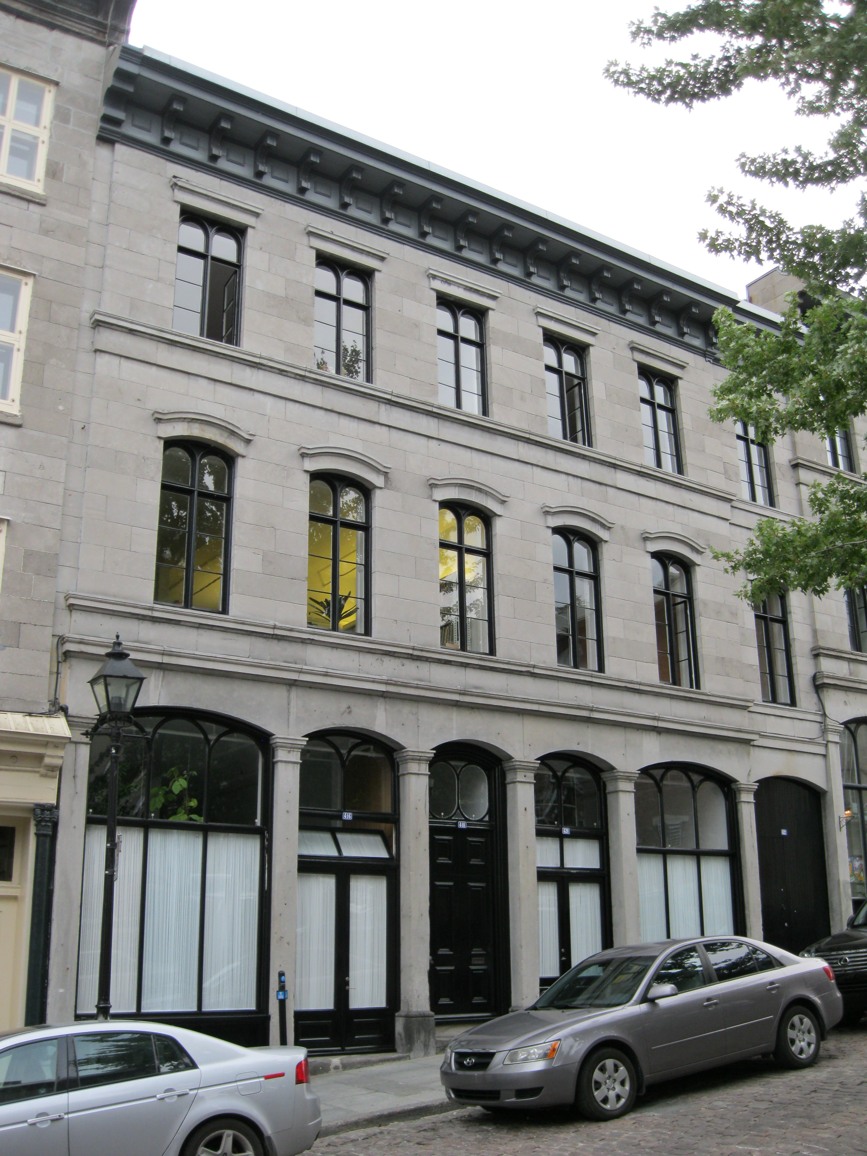 La maison Jane-Tate I, classée en 1964, est une maison-magasin urbaine de style néo-Renaissance, construite en 1863 et 1864. Elle est située au 416-420, rue de Bonsecours, dans le Vieux-Montréal.